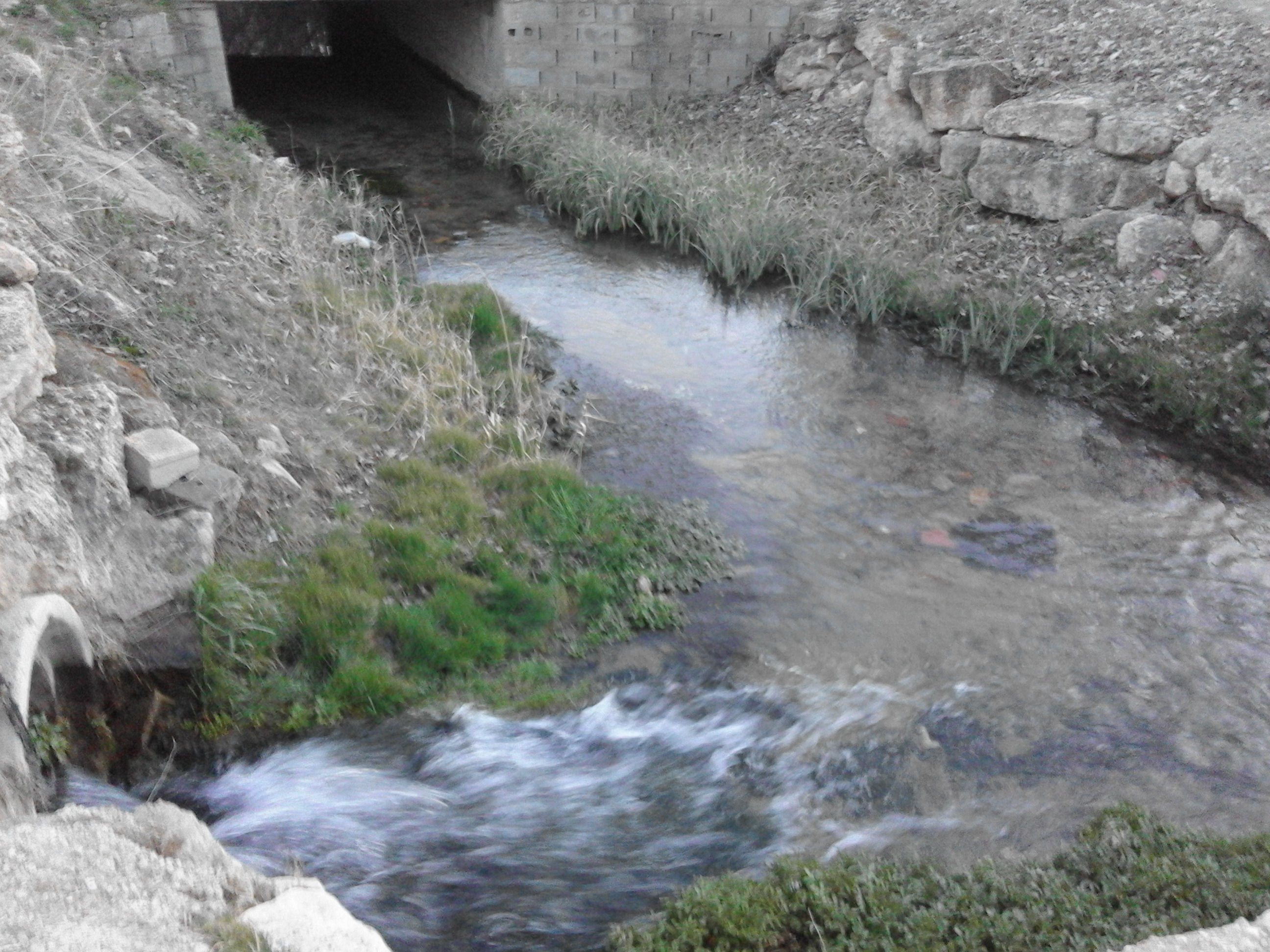 Rio Pequeño